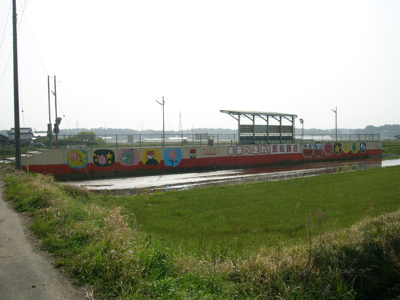 Ogawakoukoushita Station